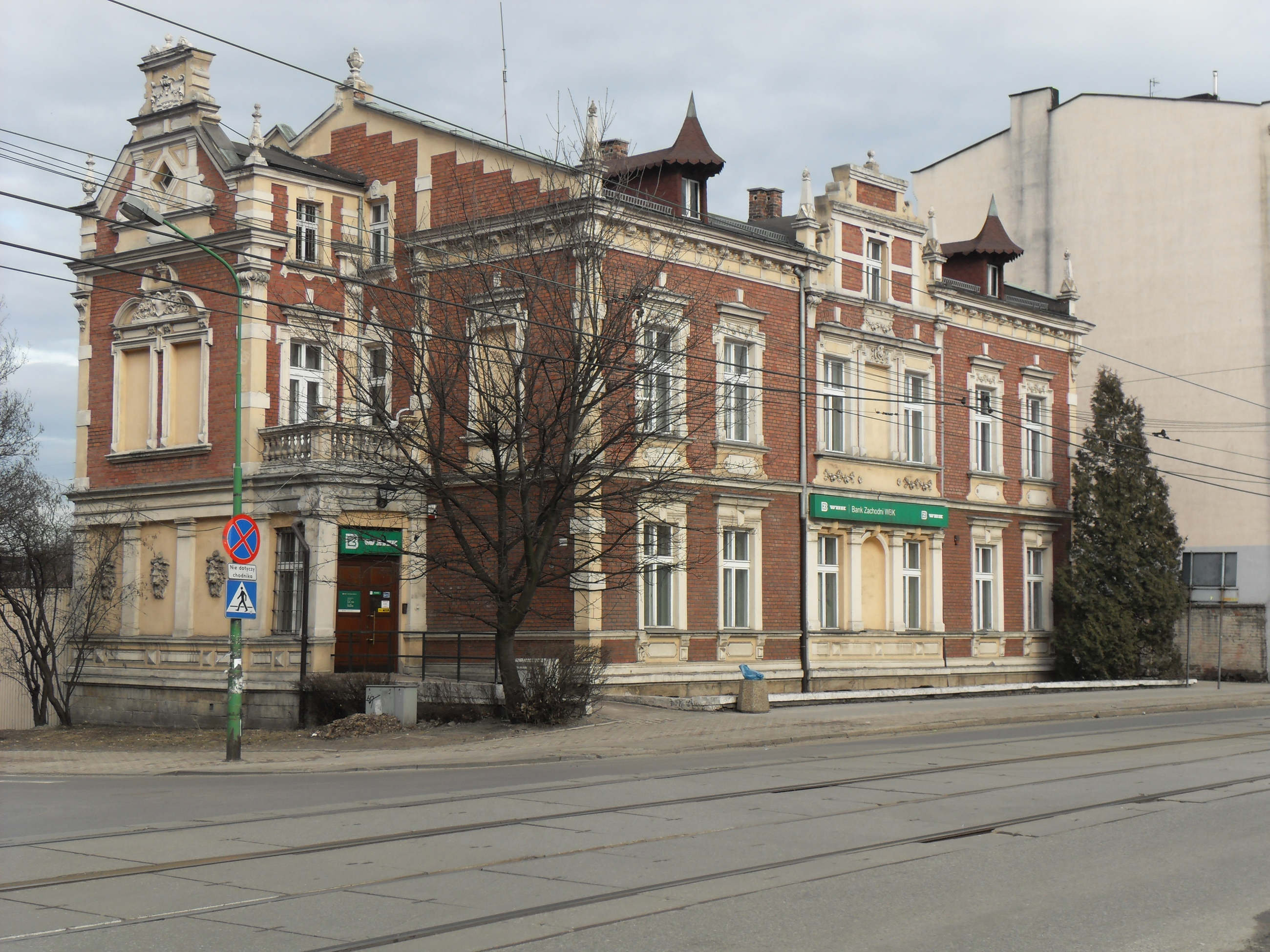 Świętochłowice - Willa Wallisów